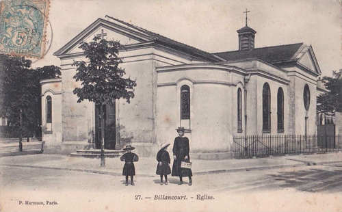 Ancienne église de l'Immaculée Conception de Boulogne-Billancourt, place Bir-Hakeim.